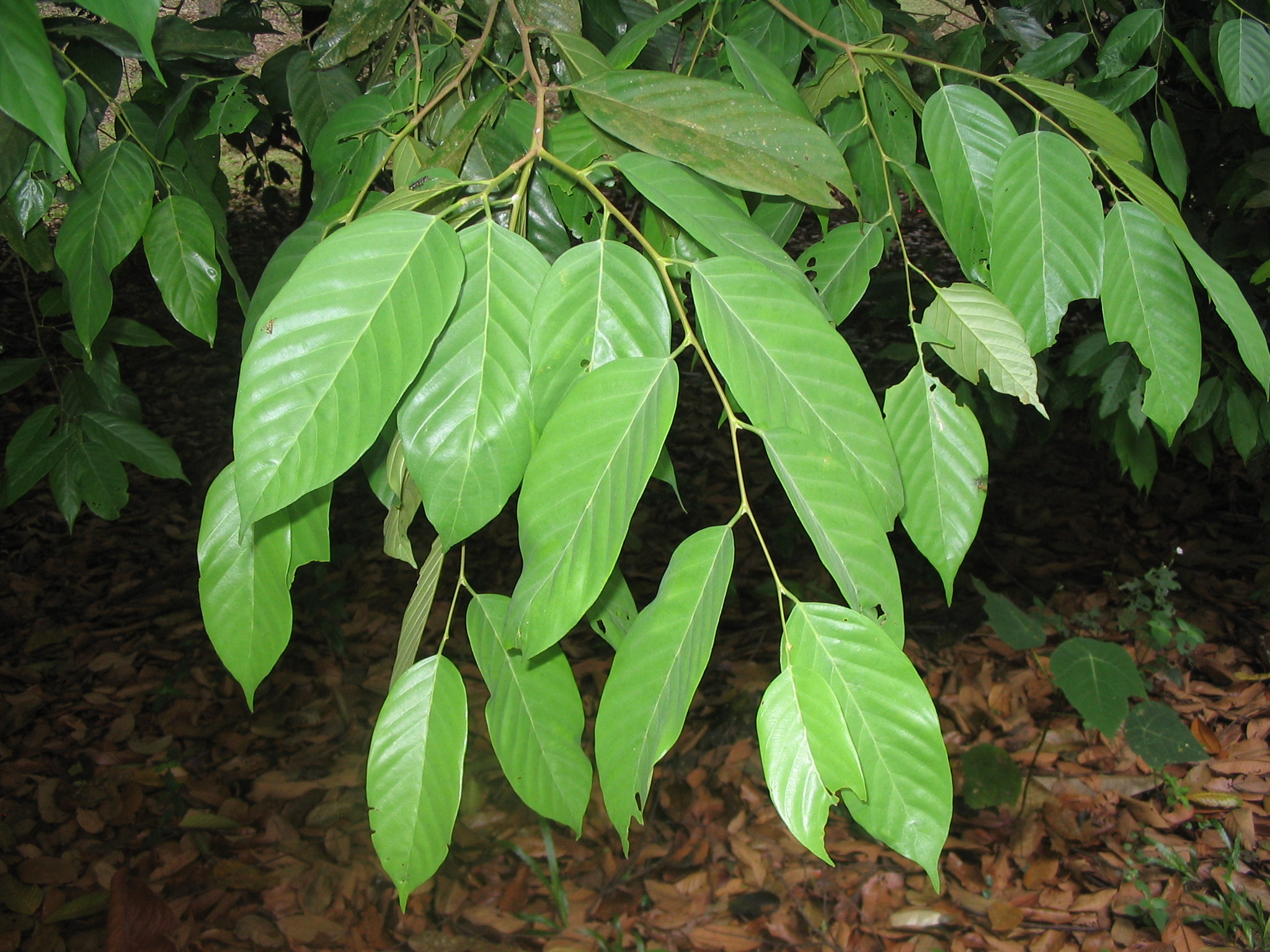 Shorea sumatrana - Feuilles - Forest Research Institute of Malaysia - kepong- Malaisie